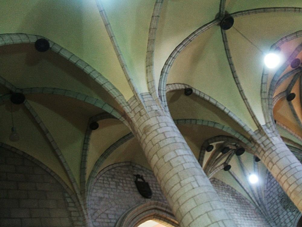 Bóvedas de la iglesia de San Vicente Mártir, Vitoria-Gasteiz, España/Spain